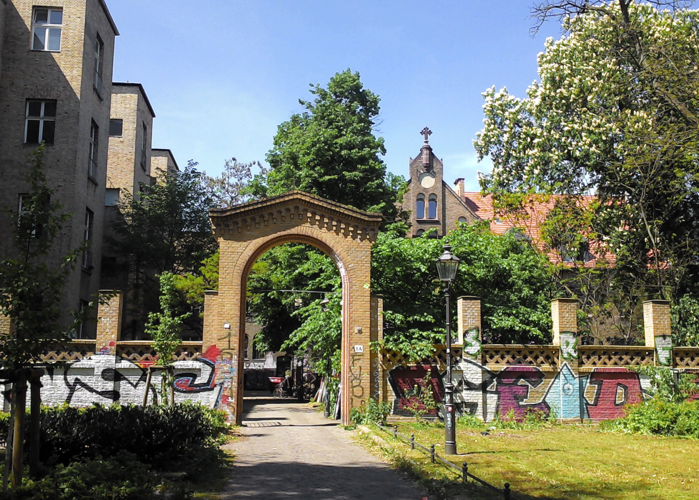 Heutiges Kunstzentrum und ehemaliges Krankenhaus Bethanien in Berlin-Kreuzberg, Germany. Zugang zum 1971 besetzten Georg-von-Rauchhaus.